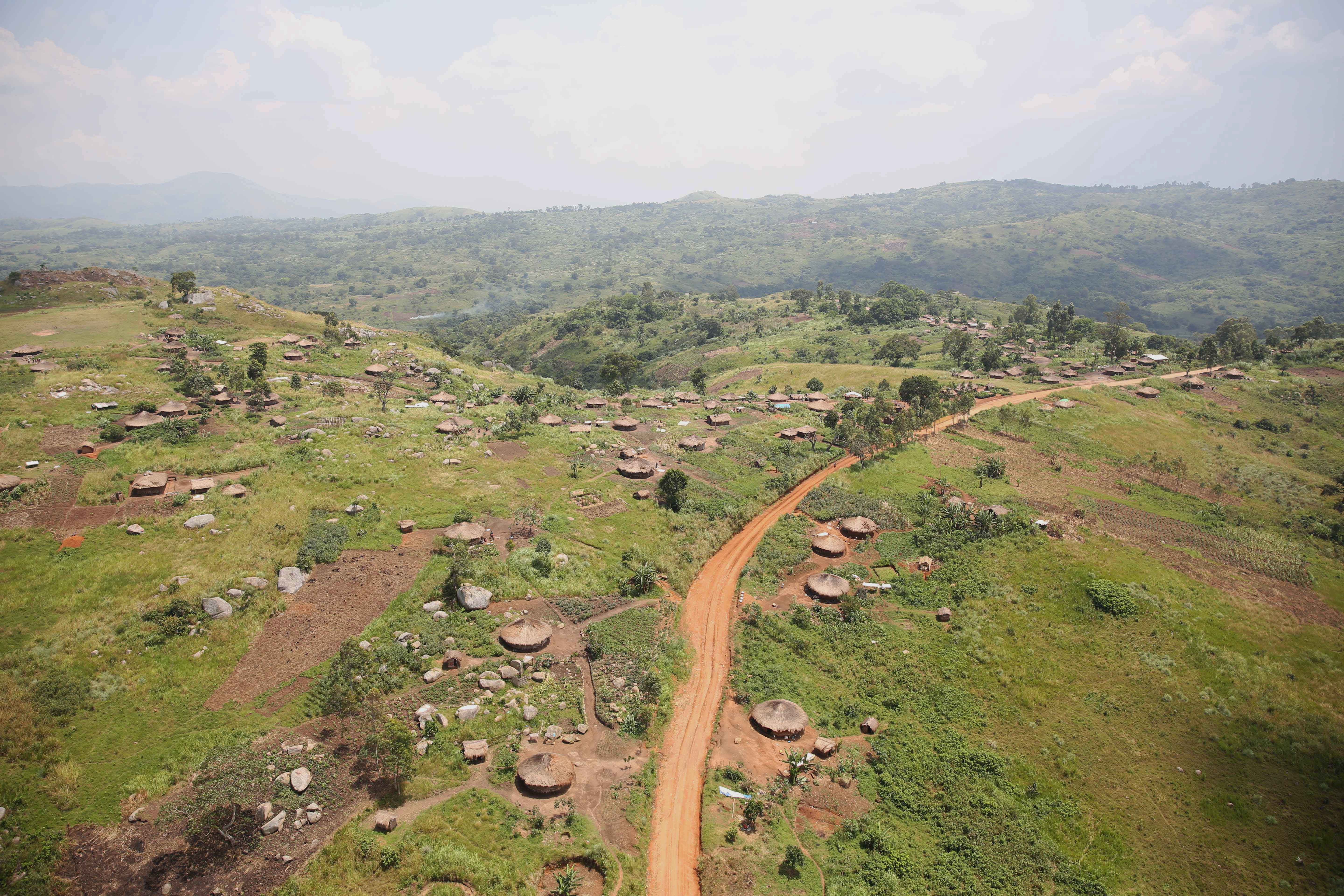 photo MONUSCO / Abel Kavanagh